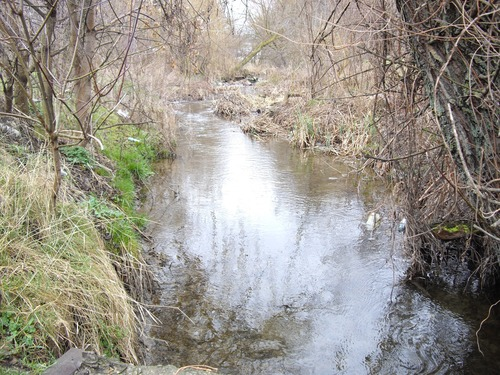 Река Славянка в нижнем течении, на территории Анатры.